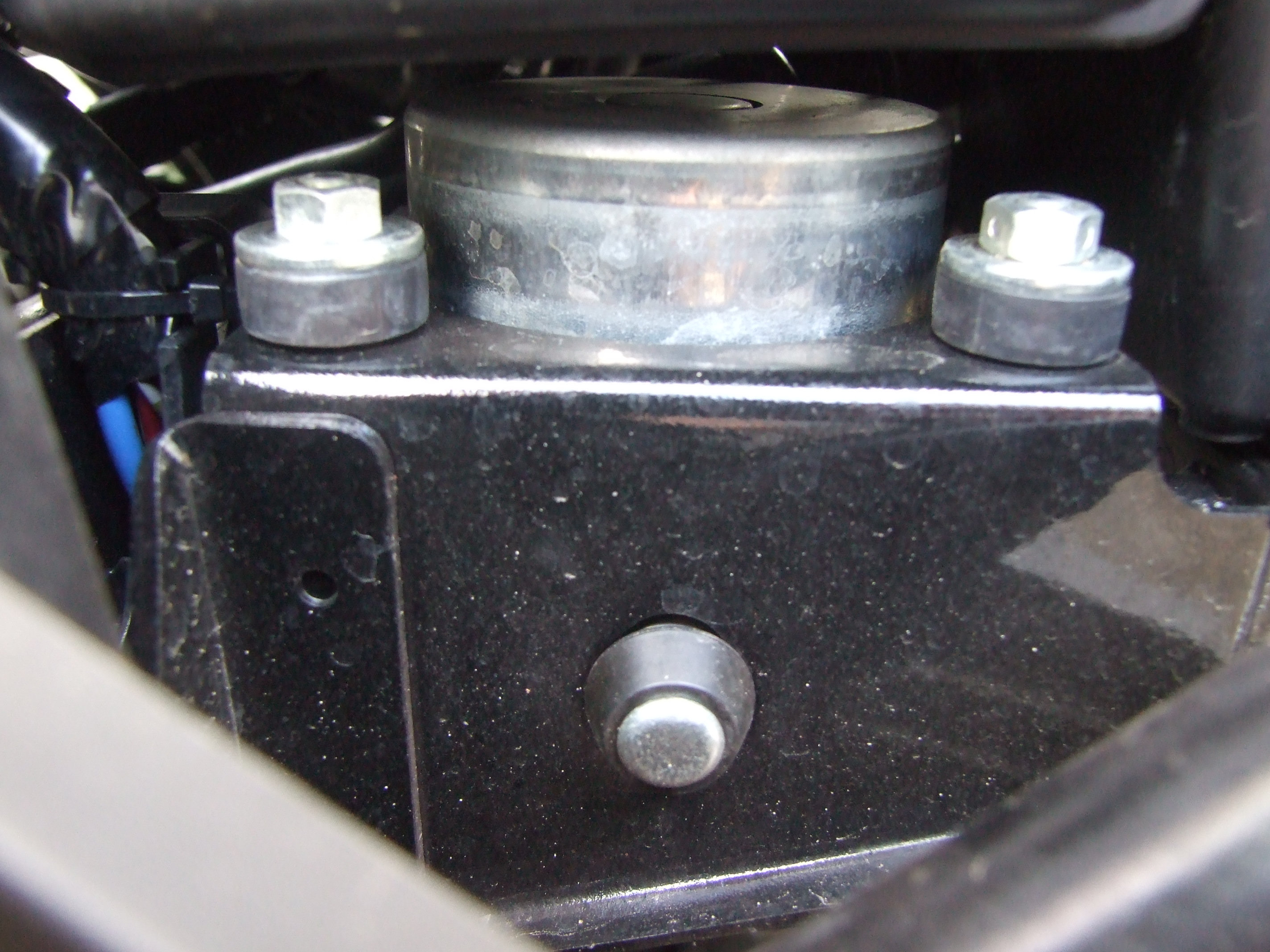 Bosch ABS-8M Antiblockiersystem am Motorrad